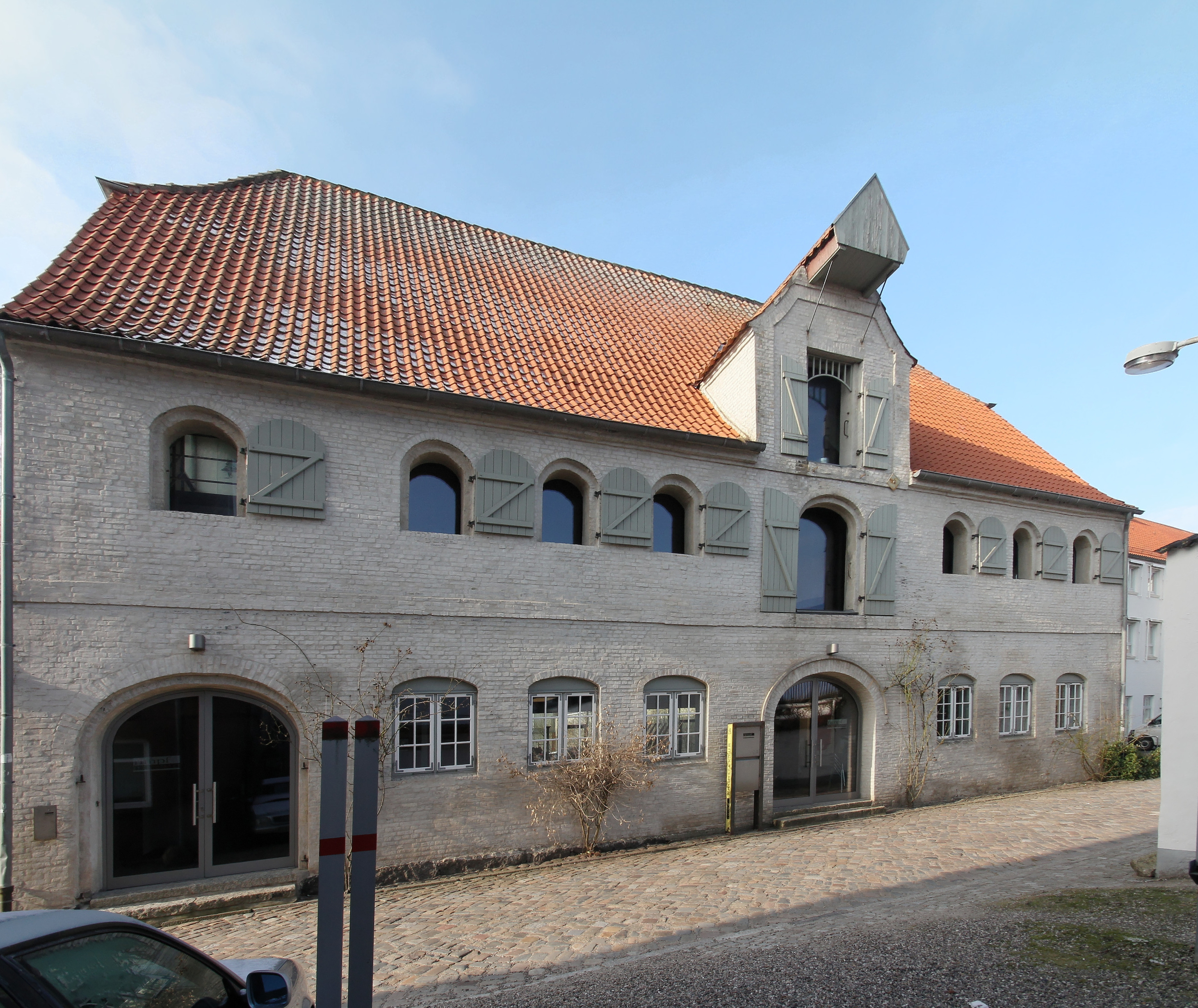 Eckernförde, Rosengang 4; Schuchspeicher